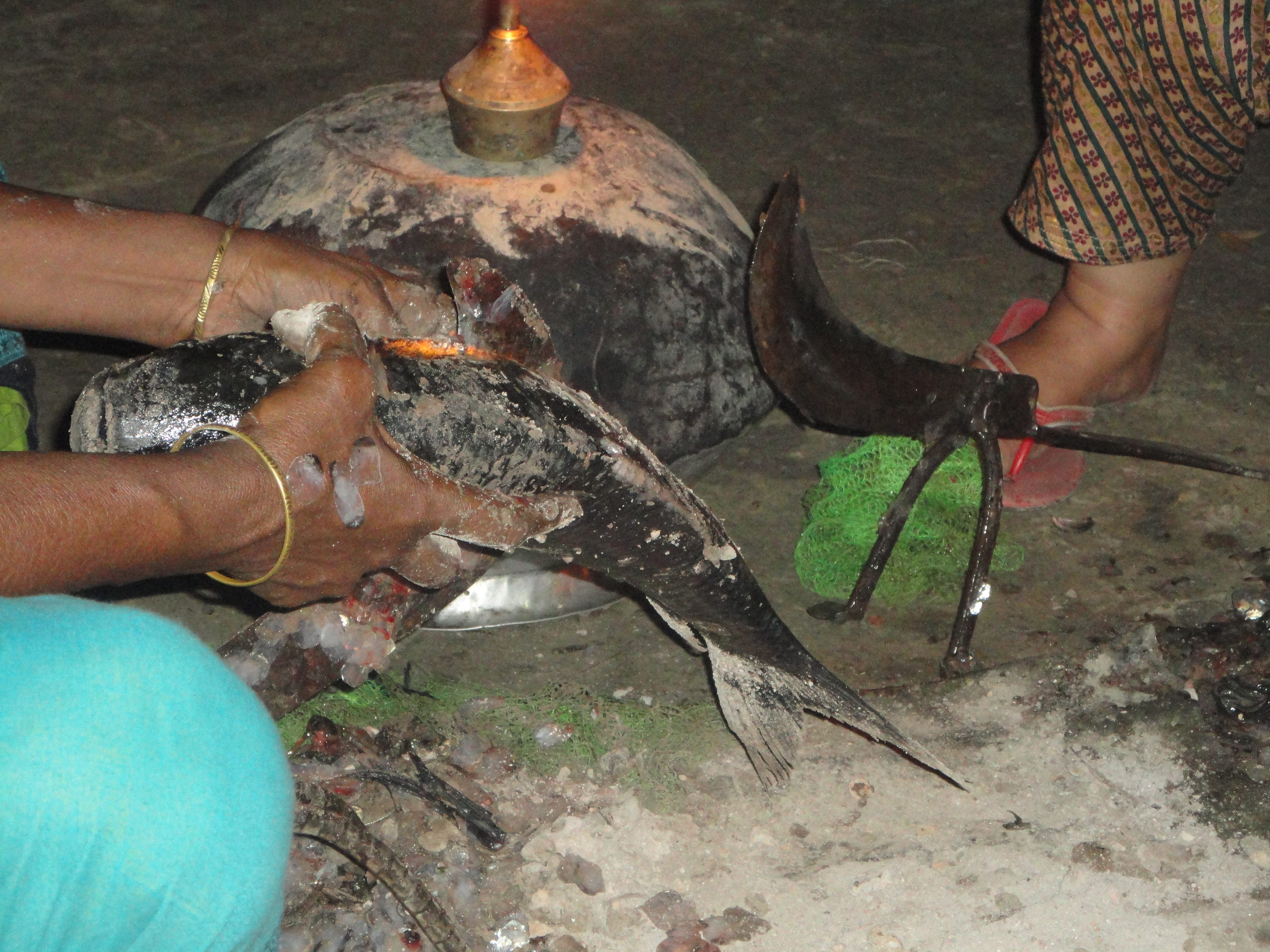 বটিতে মাছ কাটা হচ্ছে, পাশে একটি খালি বটি।